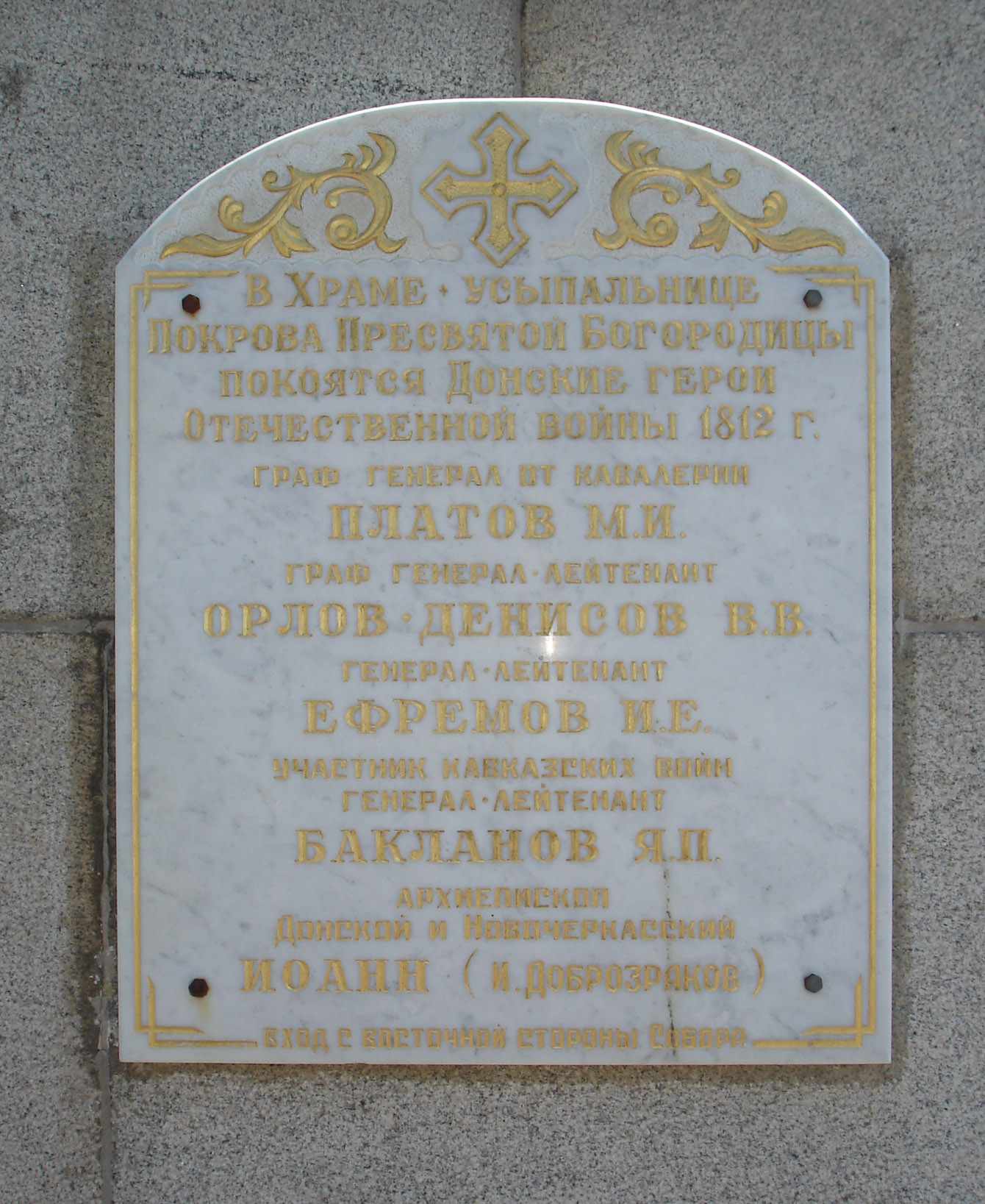 Мемориальная доска на стене Новочеркасского собора